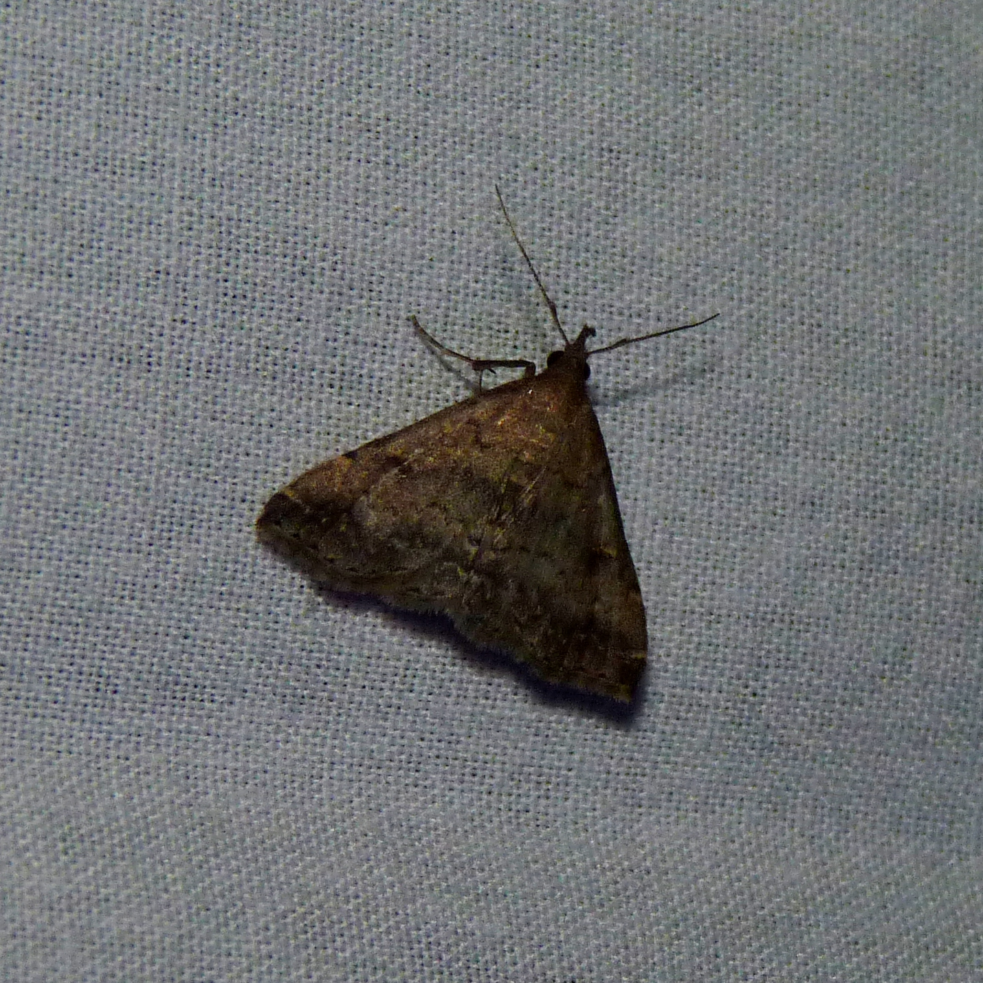 Florida Tetanolita (Tetanolita floridana) – Hodges#8368. BugGuide / MPG